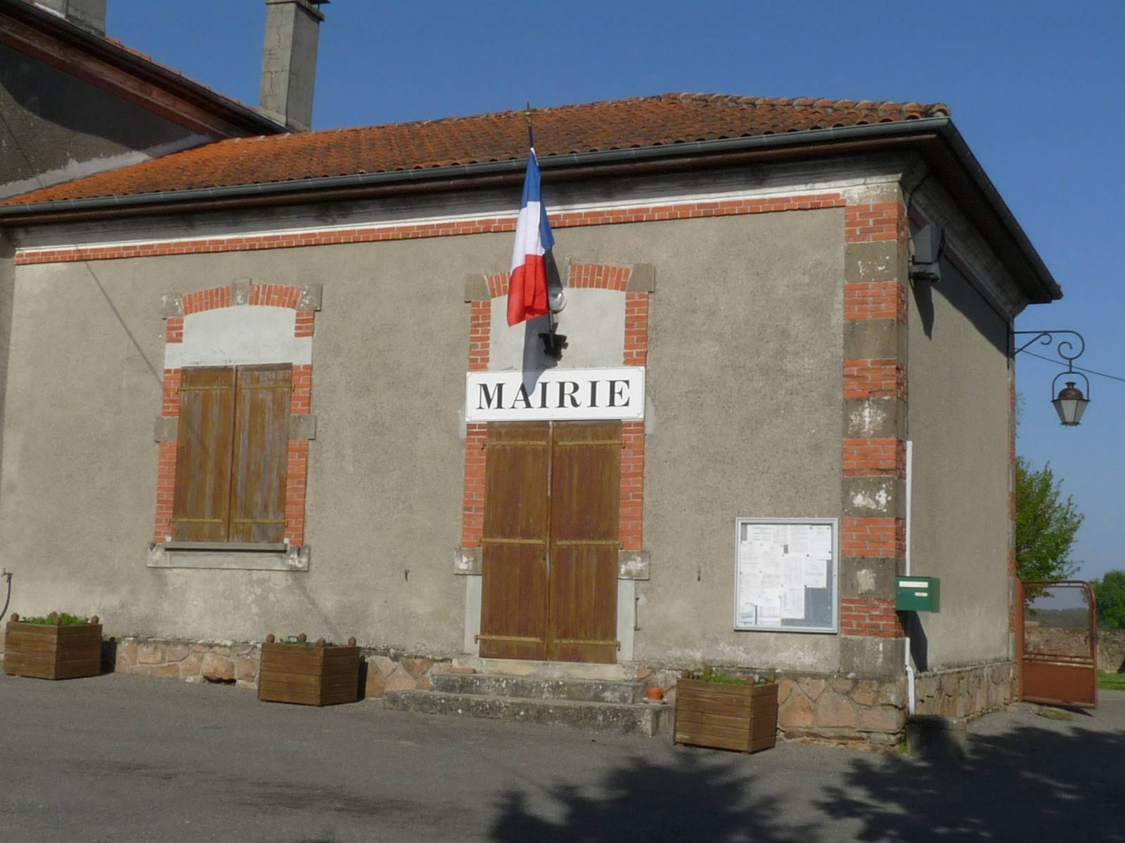 mairie de Mouzon, Charente, France